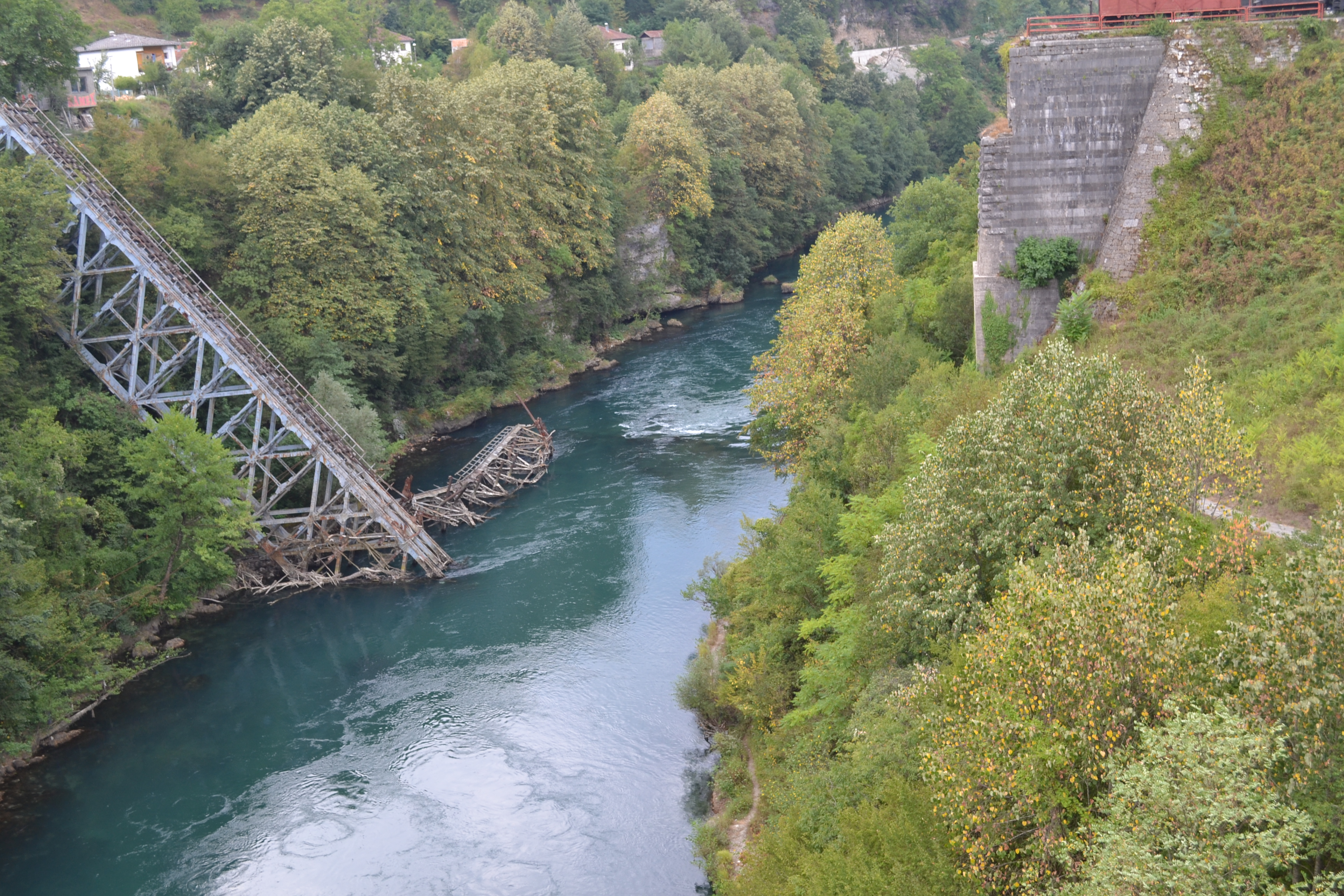 Srušeni most u Jablanici